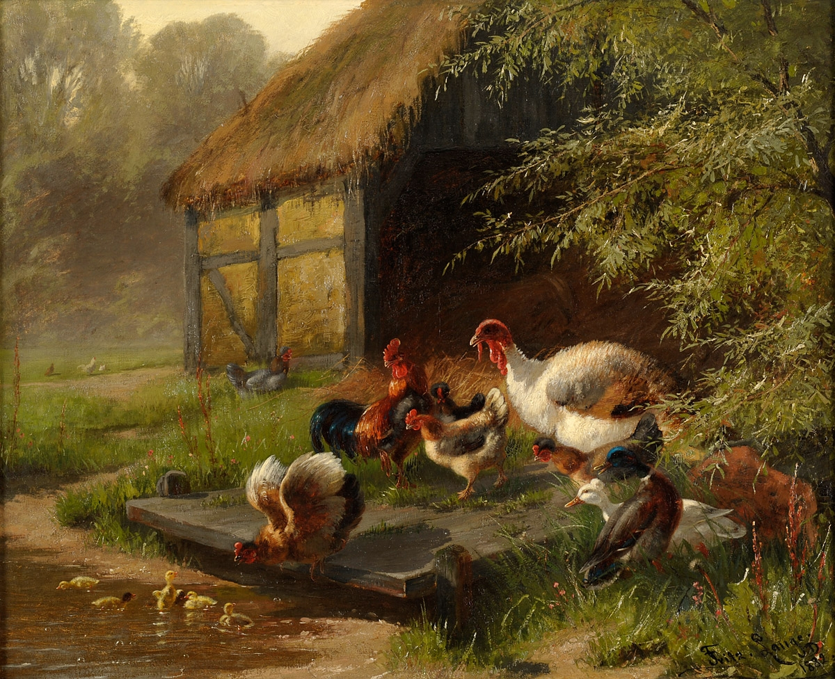 Buntes Federvieh. Signiert. Datiert 1882. Öl/Lwd., 66 x 82 cm